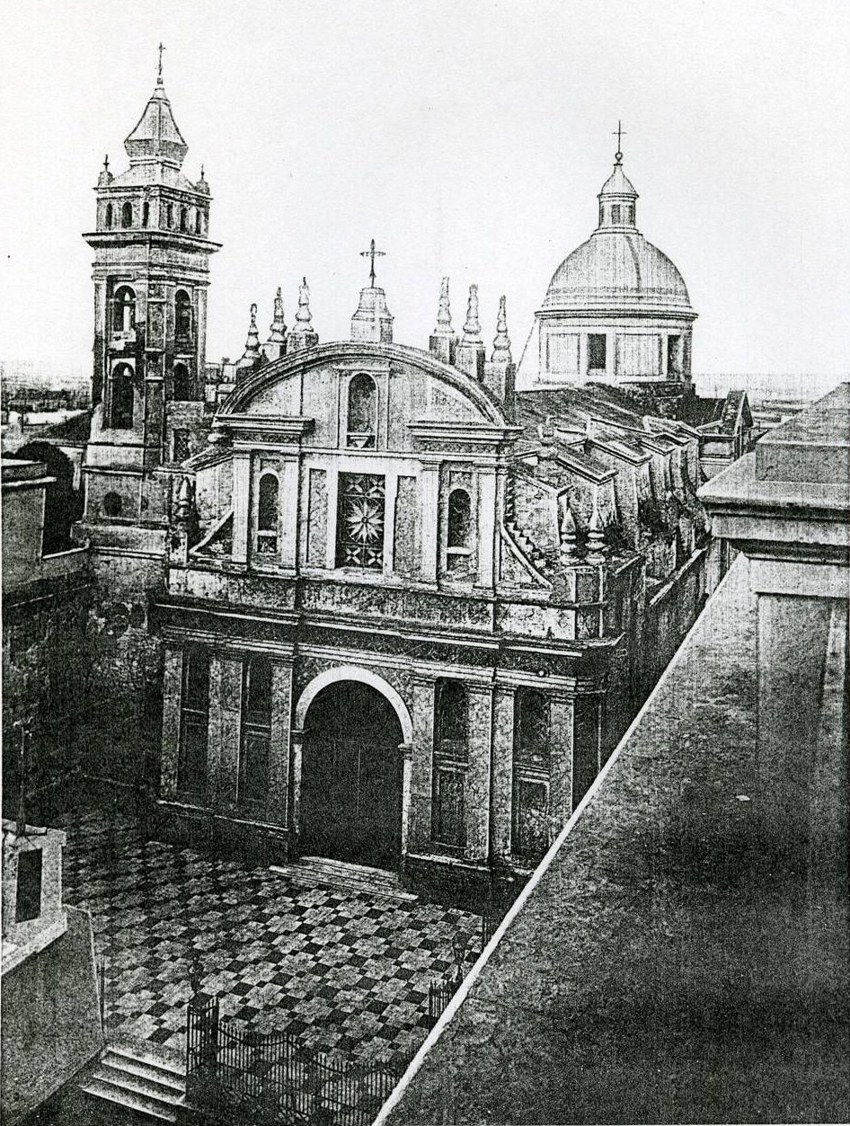 Fachada original de la Iglesia de Nuestra Señora de la Merced en Buenos Aires, diseñada por los arquitectos jesuitas Bianchi y Primoli en 1721. Fue totalmente modificada por el arquitecto Buschiazzo entre 1894 y 1900.